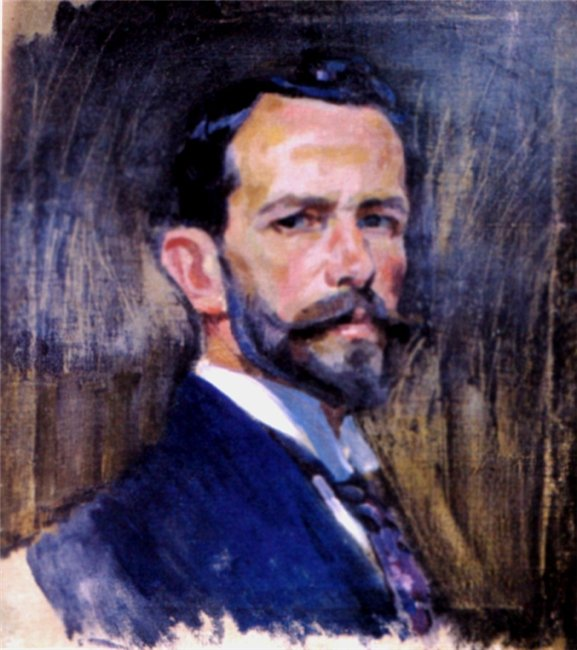 Self-portrait